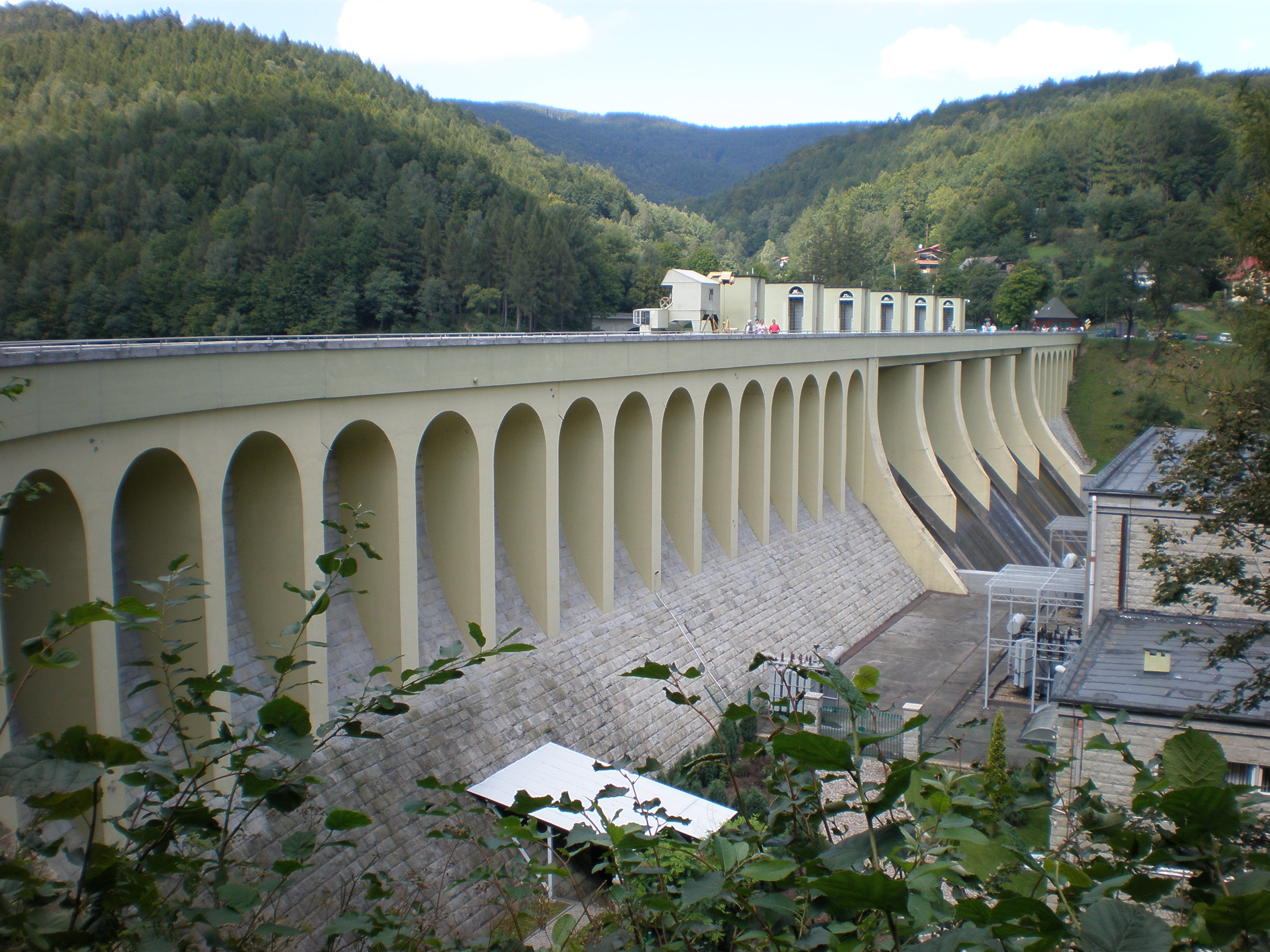 Zapora Porąbka